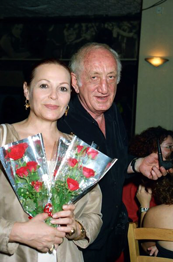 גילה אלמגור ויעקב (יענקלה) אגמון במסיבת יום הולדת לגילה